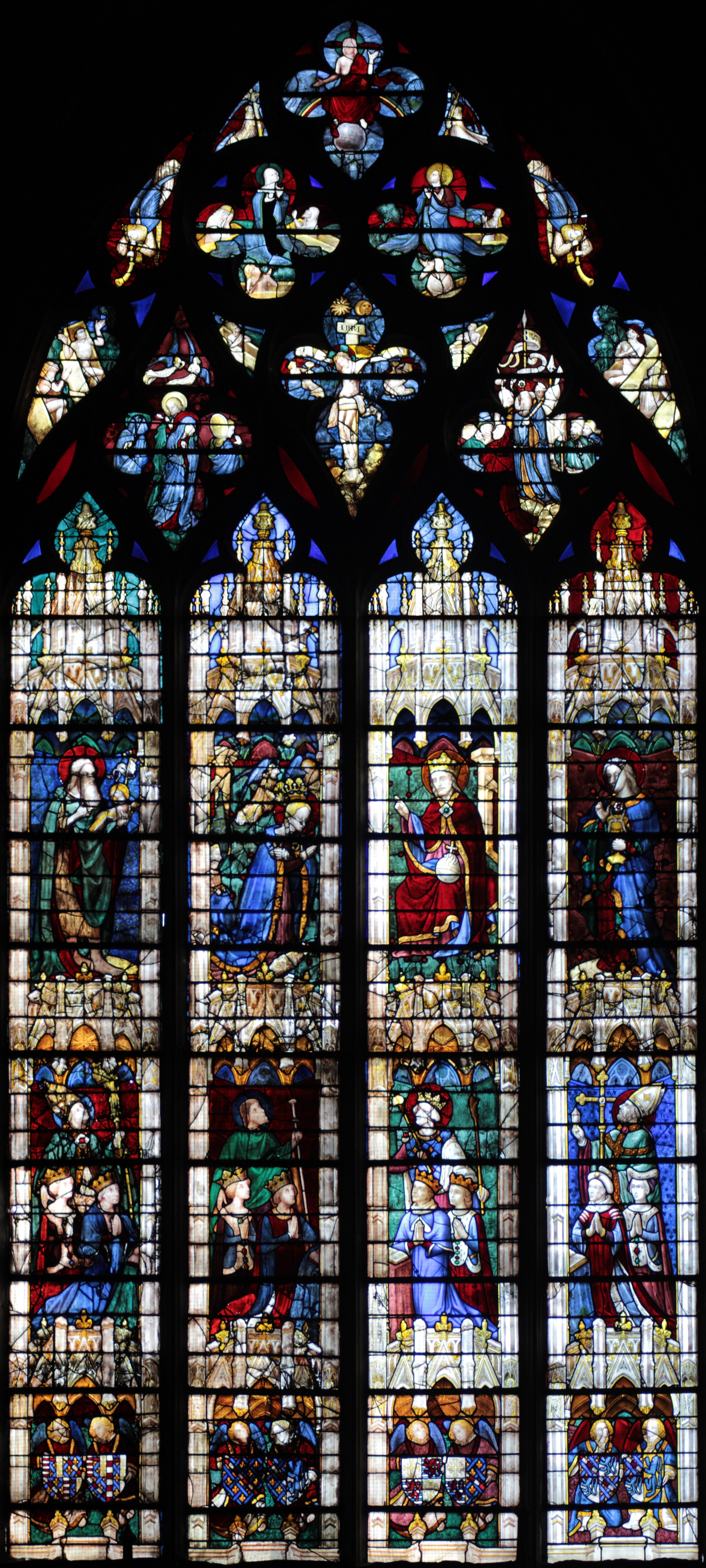 Vitrail 040 de Chartres - Chapelle Vendôme